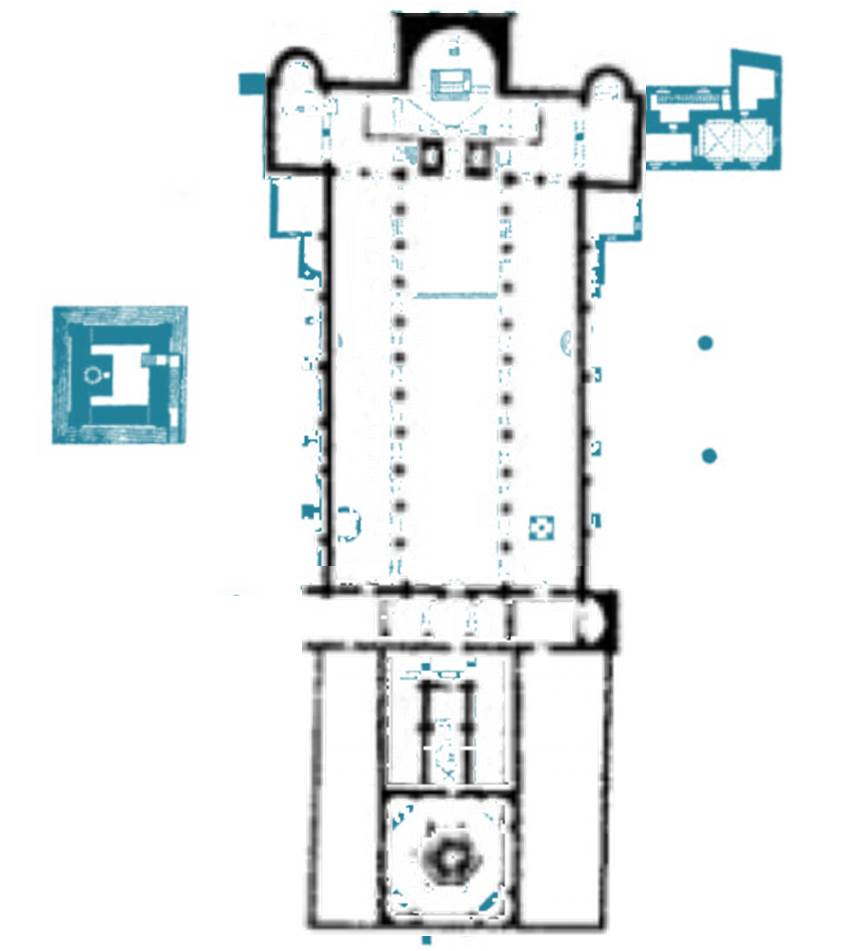 Aquileia Basilica as built by Maxentius